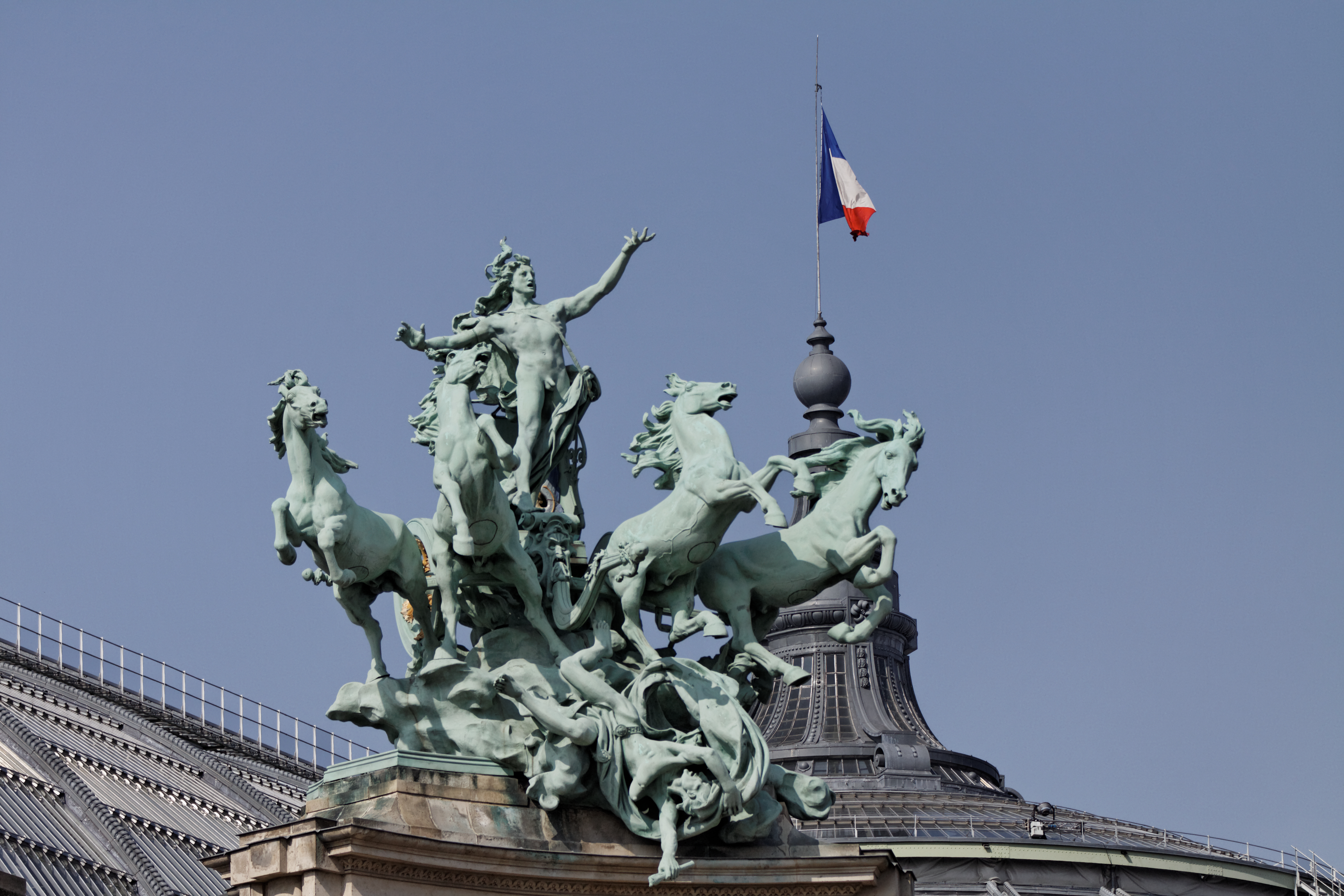 Vue de détail du Grand Palais.